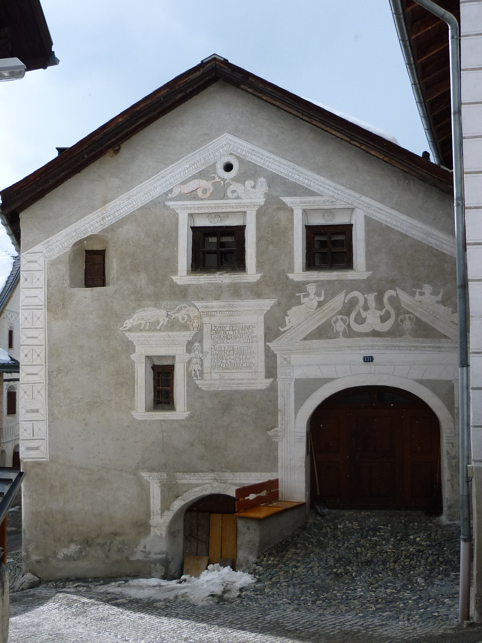 Haus Aual 131, Ardez GR, Schweiz